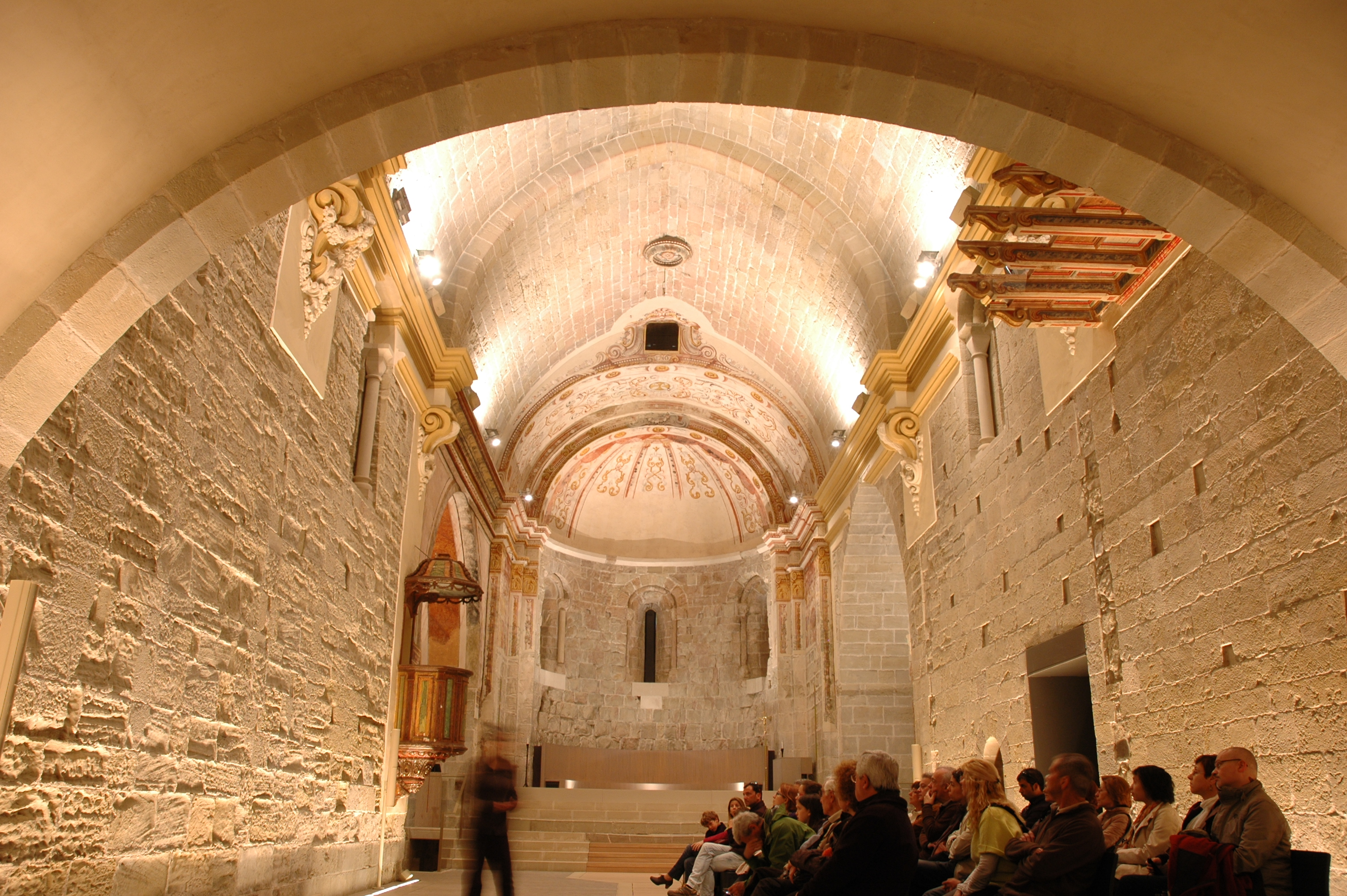 Sant Benet de Bages - Església - interior